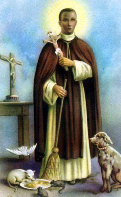 Martin de Porres